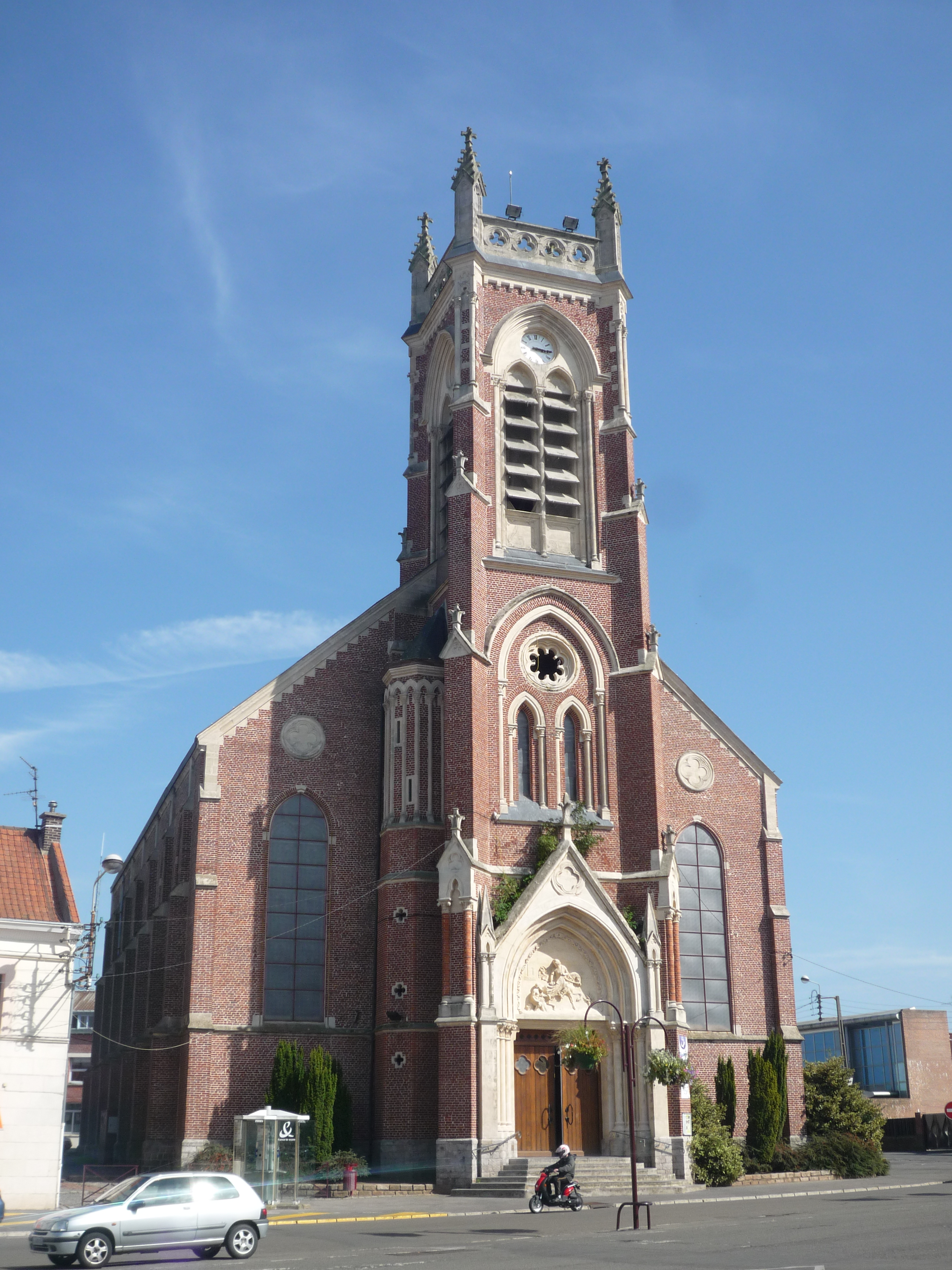 Église Saint-Martin d'Aniche, Nord, Nord-Pas-de-Calais, France.